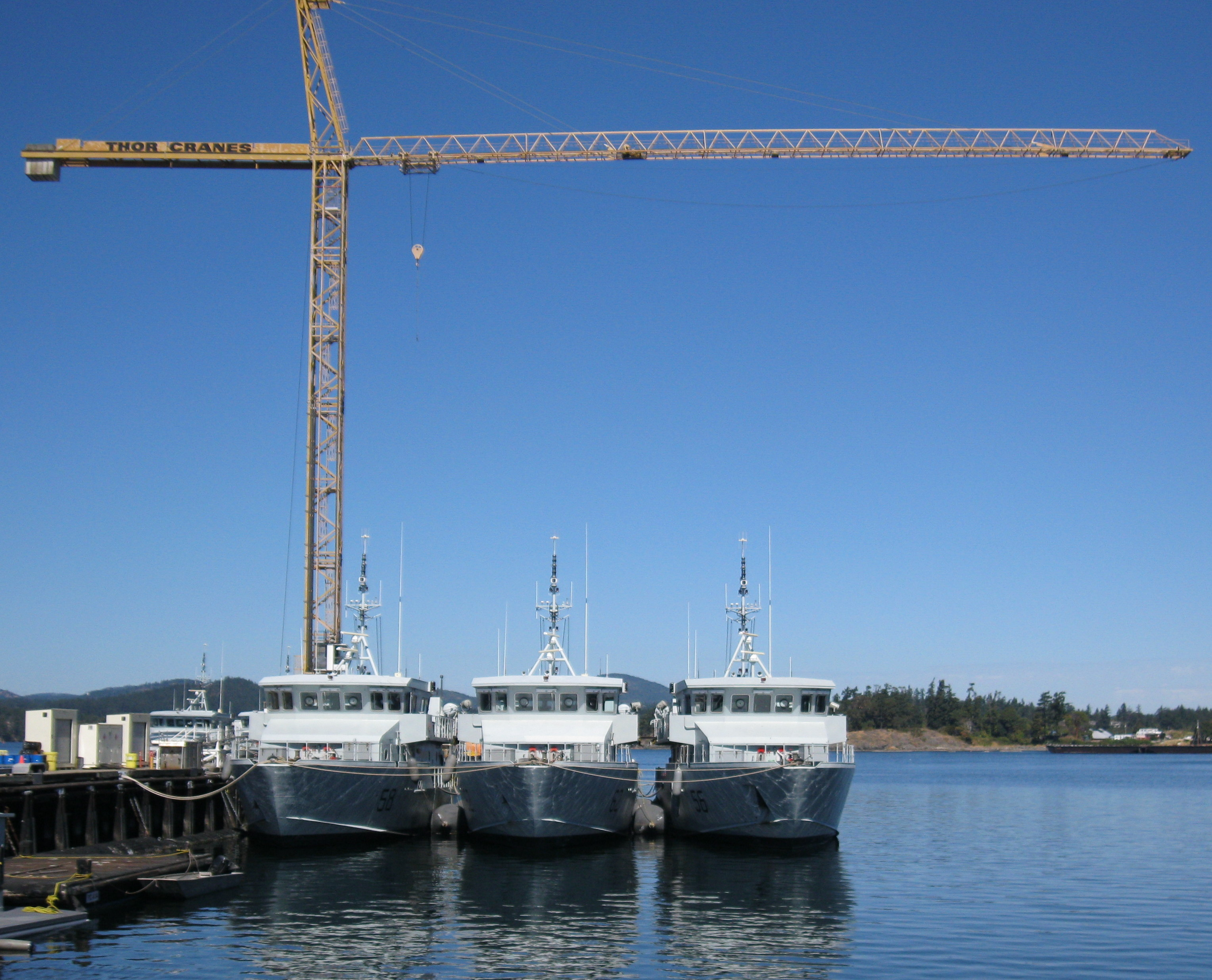 Orca-class patrol vessels. INFO IN PANORAMIO DESCRIPTION